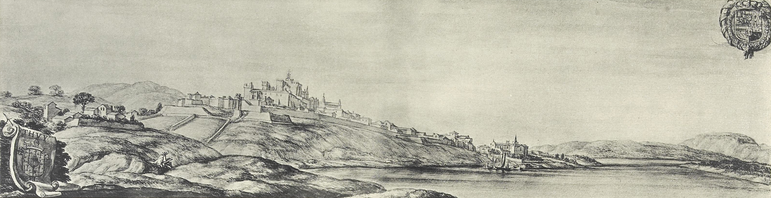 Debuxo de Tui realizado por Pier Maria Baldi en 1669.